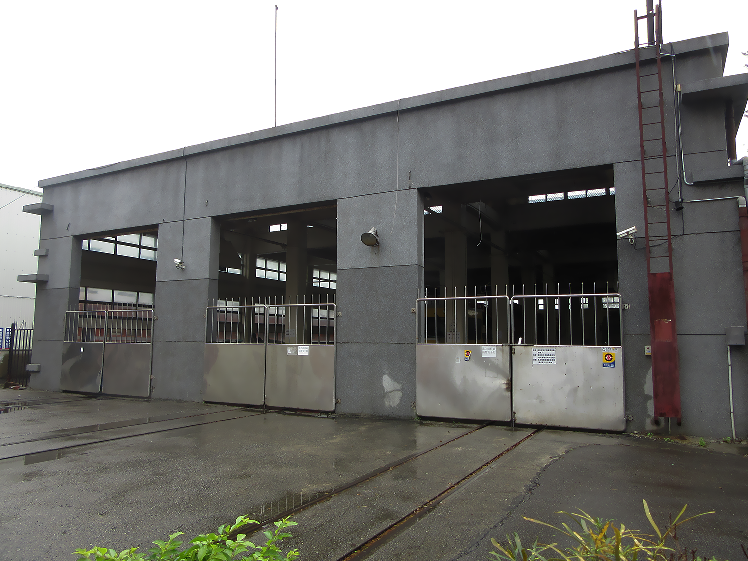 苗栗電力機車庫，現為工程車之車庫與工廠